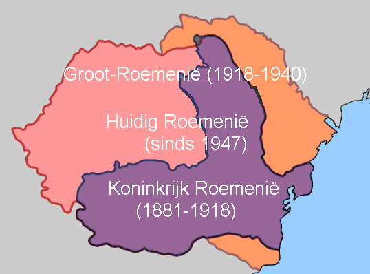 Dutch translation from Roemenië voor en na de beide oorlogen: het paarsgekleurde deel vormt het Roemenië van voor WOI. Paars, roze en oranje vormen Roemenië tijdens het interbellum. Paars en roze vormen het naoorlogse Roemenië. Nederlandse vertaling van bovenstaand bestand.